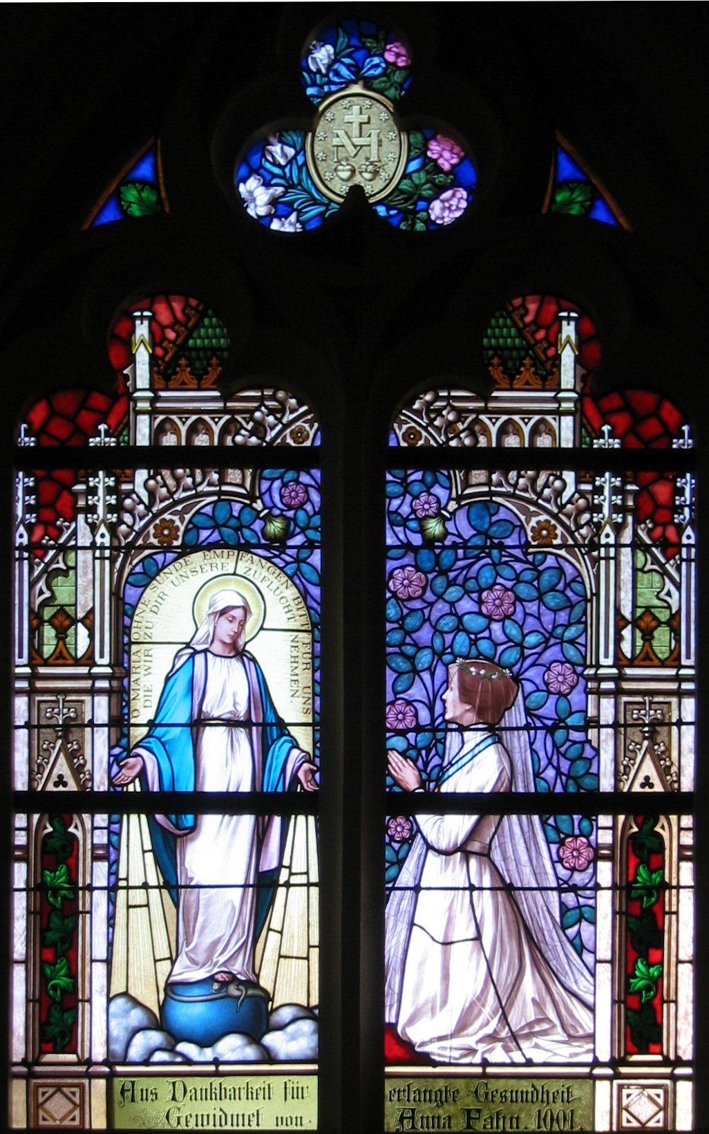 Maßwerkfenster in der katholischen Pfarrkirche heiliger Martin in Sitzendorf an der Schmida